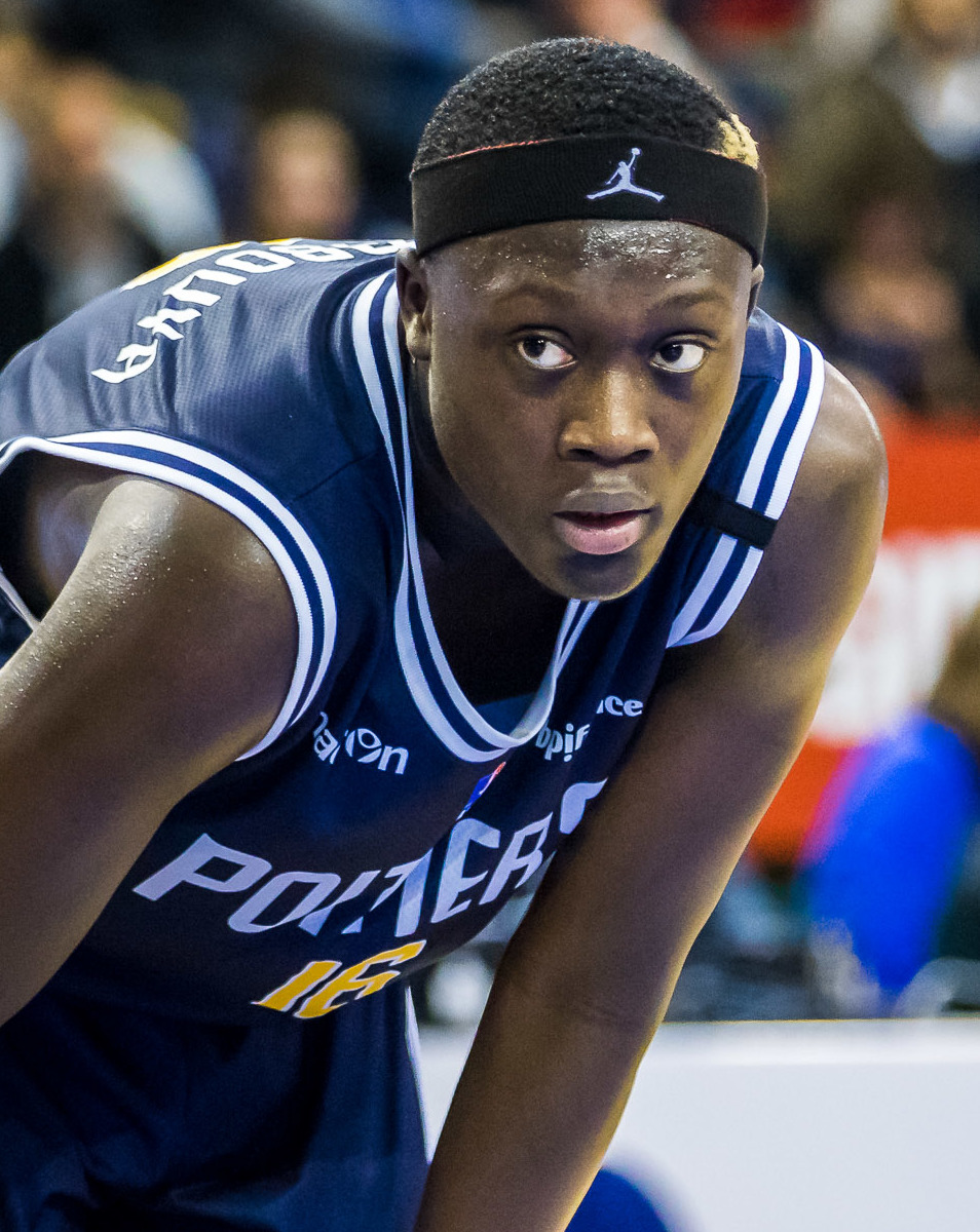 Hermine Nantes Atlantique 75-78 PB86